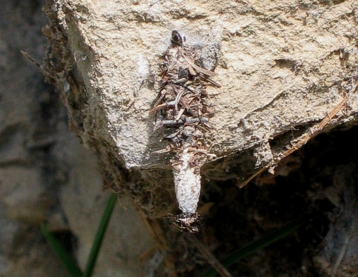 Sack von Sterrhopterix standfussi